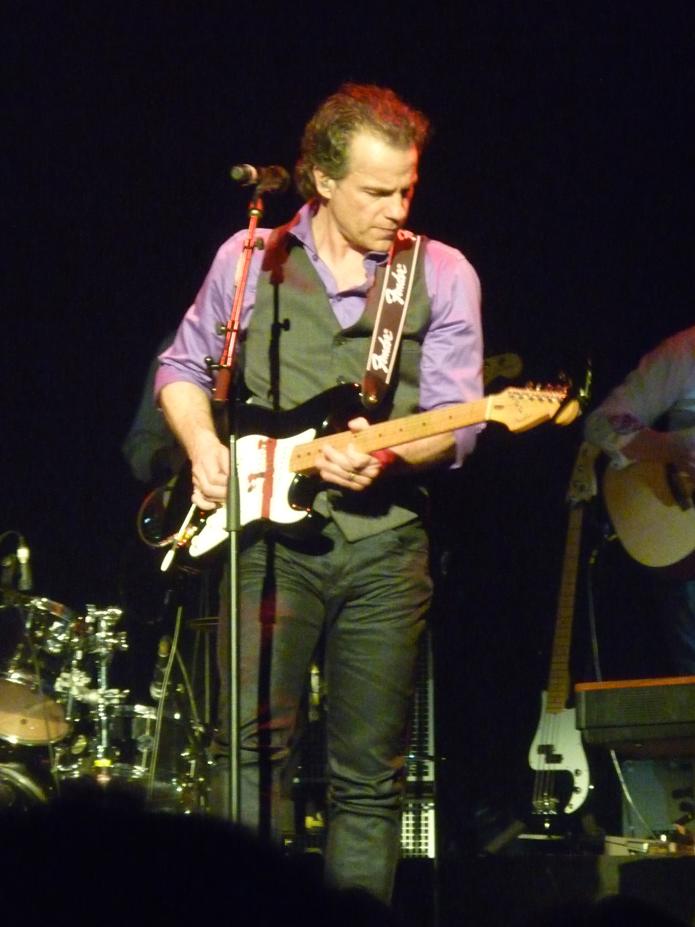 Bruno Pelletier lors de son concert à La Cigale à Paris le 1er Avril 2014 (photo Thomas MOREEL)